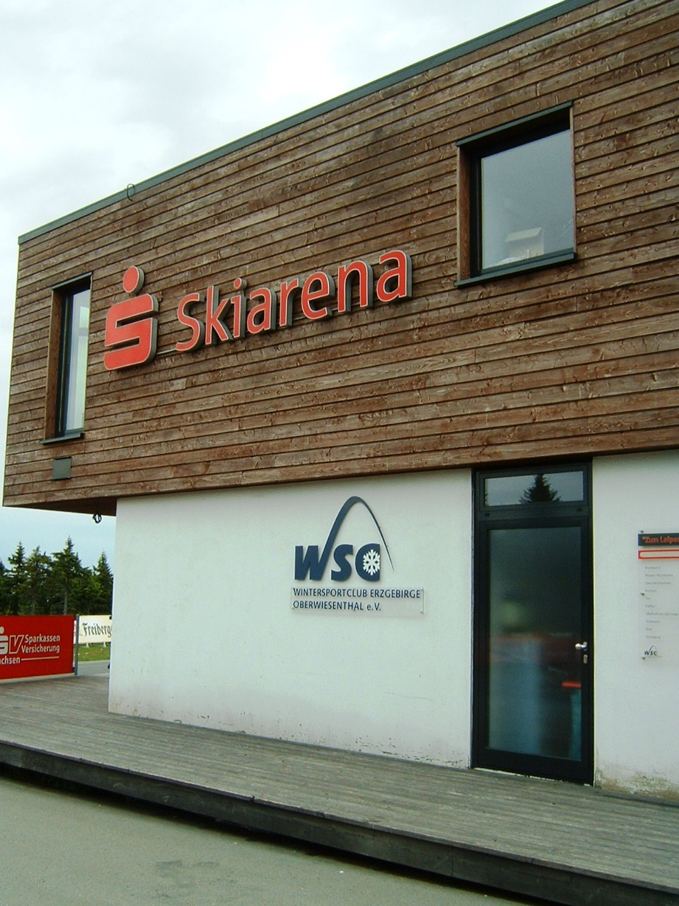 Oberwiesenthal, Skiarena, Gebäude